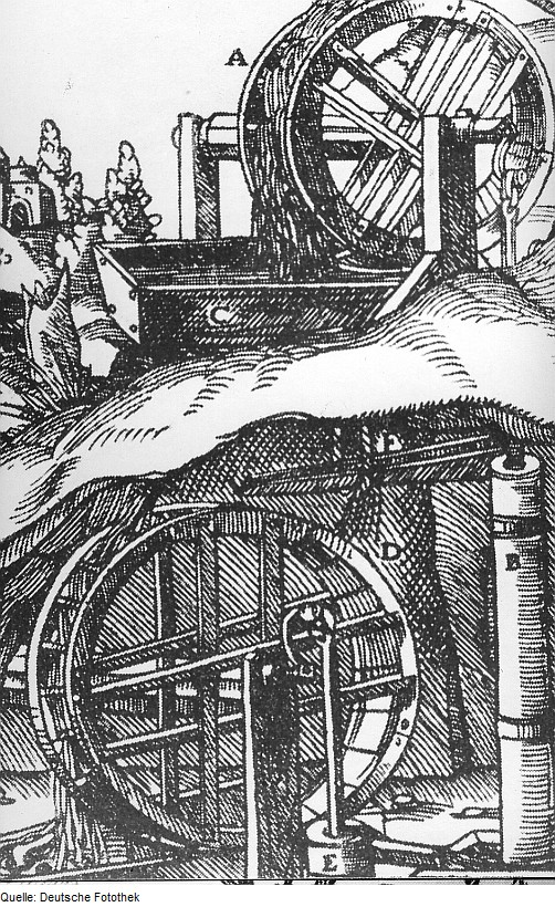 Original image description from the Deutsche Fotothek Wilsdruff-Grund. Die Radpumpe, nach Stich von Staude